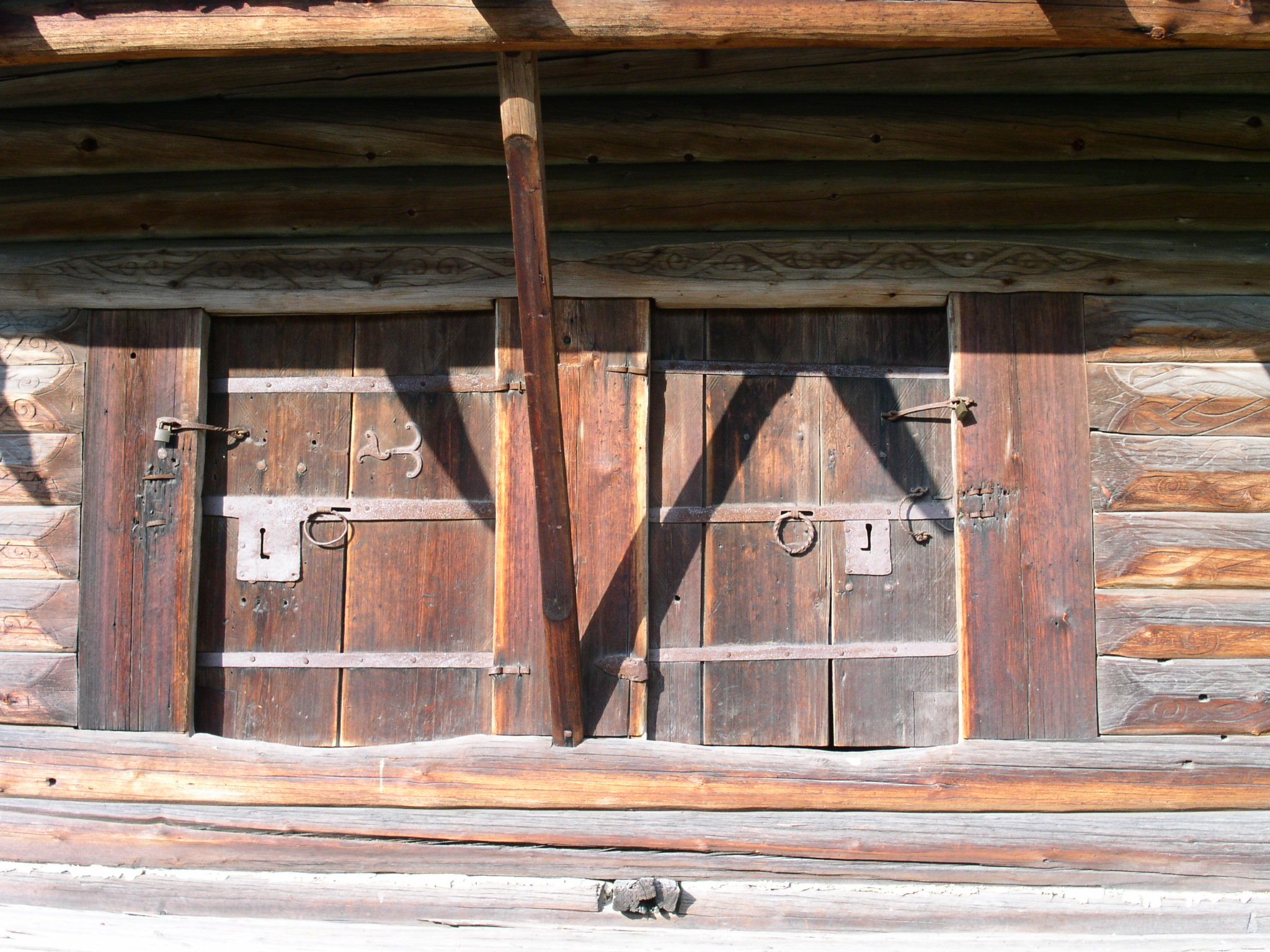 Kyrkhärbret i Älvdalen, Sveriges äldsta bevarade timmerbyggnad